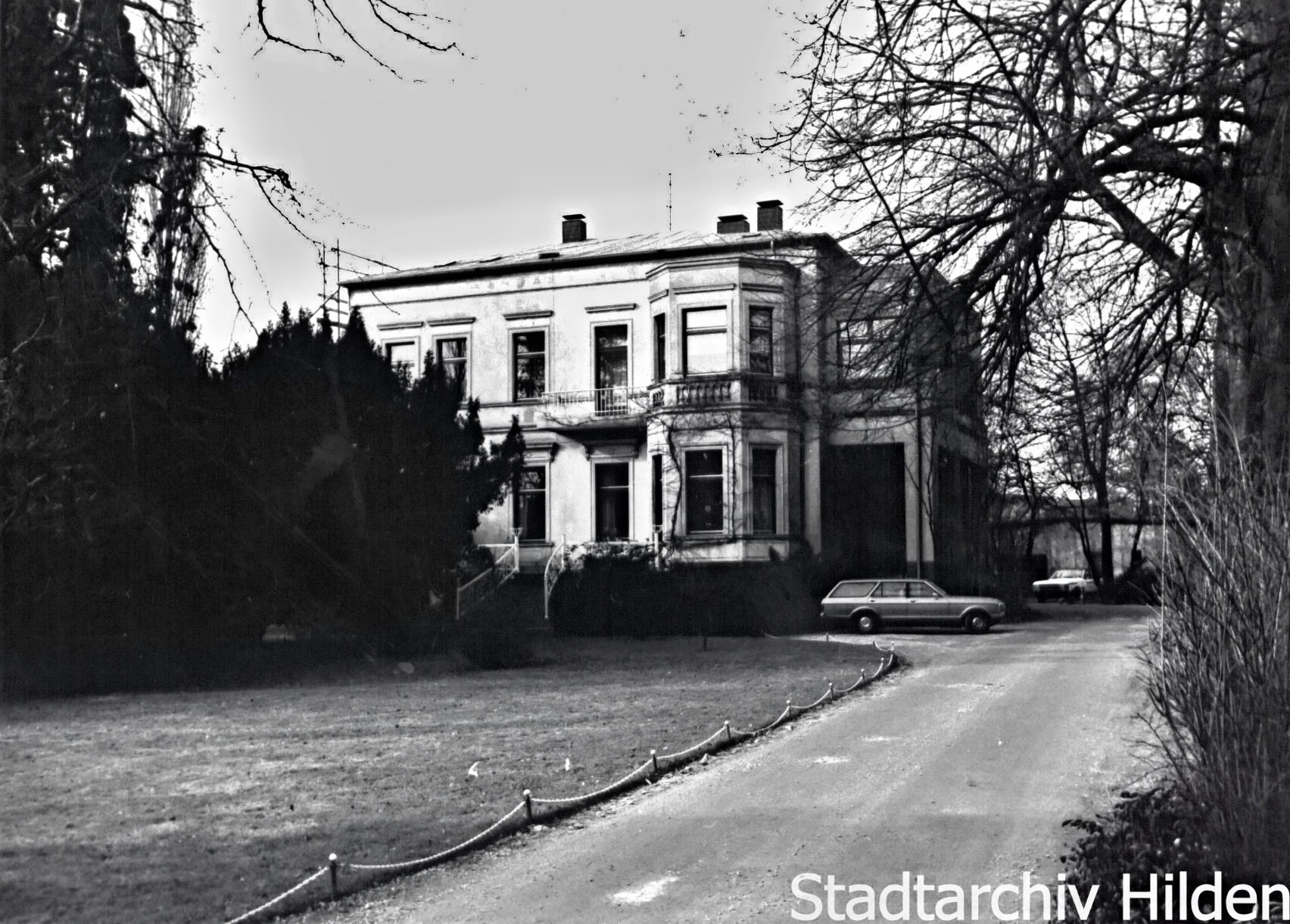 Schwarz-weiß Foto der Villa Jantsch in Hilden, Elberfelder Str. 41